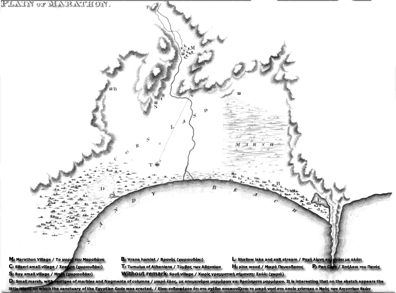 Antica mappa dell'area della battaglia di Maratona (Attica, Grecia).